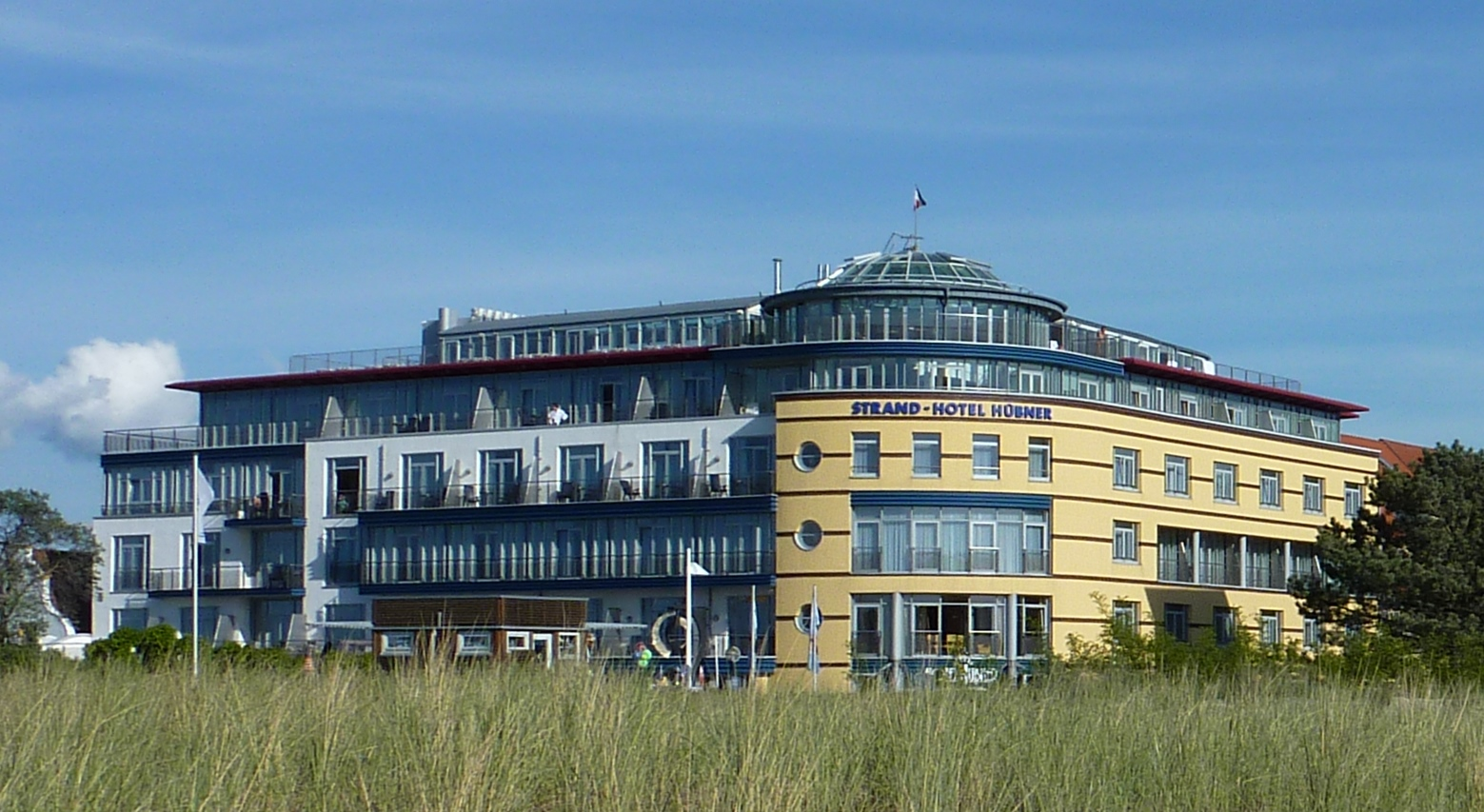 Strandhotel Hübner Warnemünde